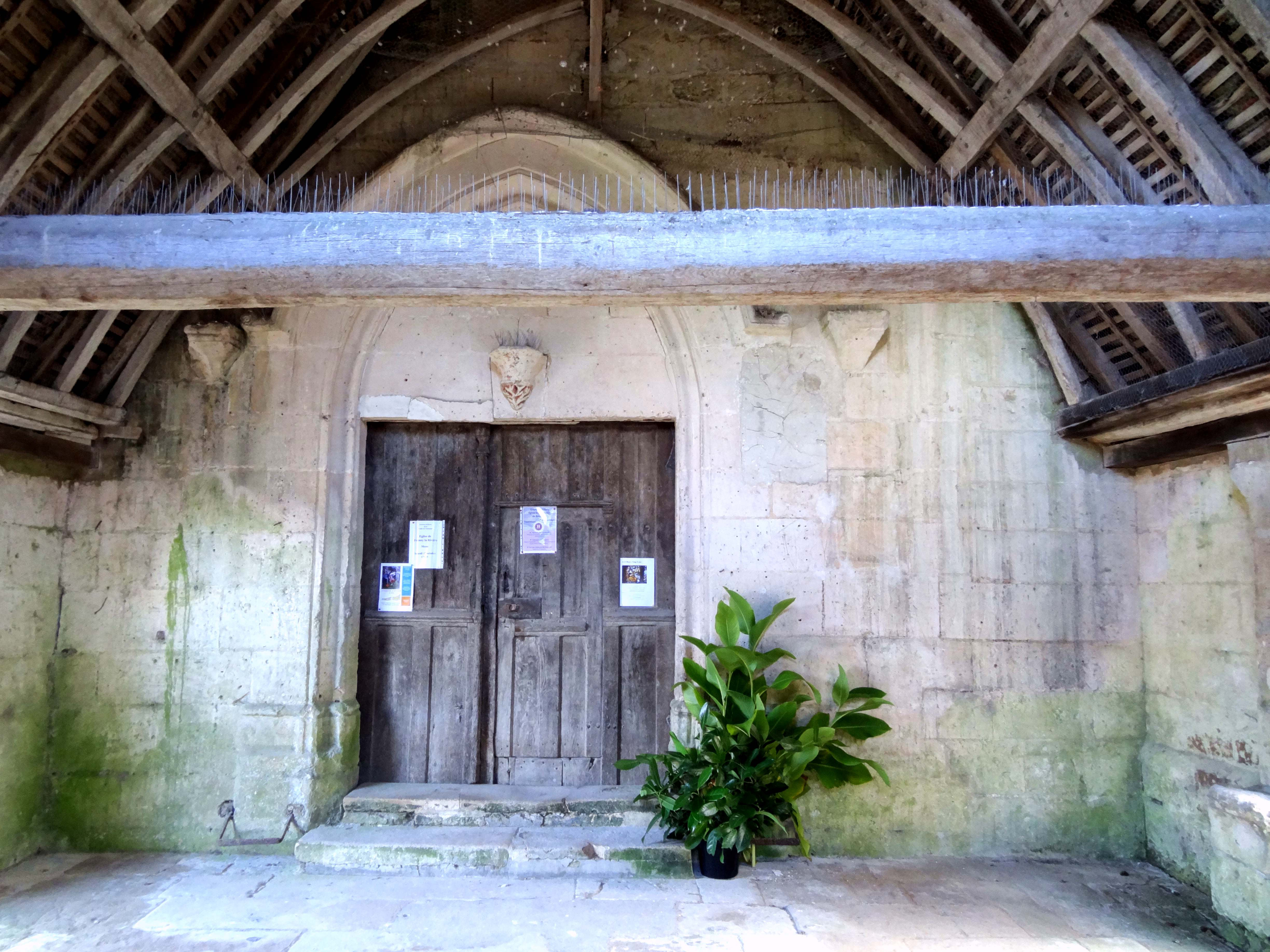 Église Saint-Denis de Fresnoy-la-Rivière - voir titre.